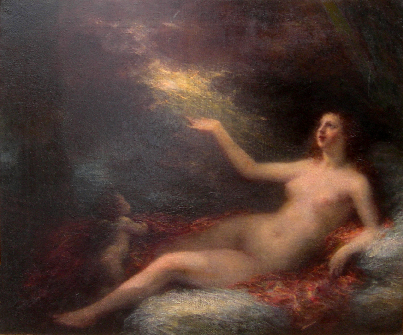 Danaé, conservé au musée d'Art et d'Industrie de Roubaix, France